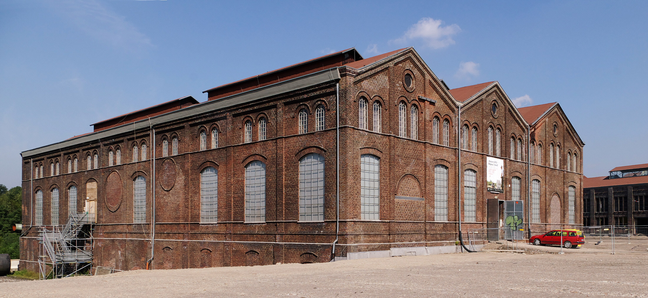 Phoenixhalle (Dortmund) von Südwesten